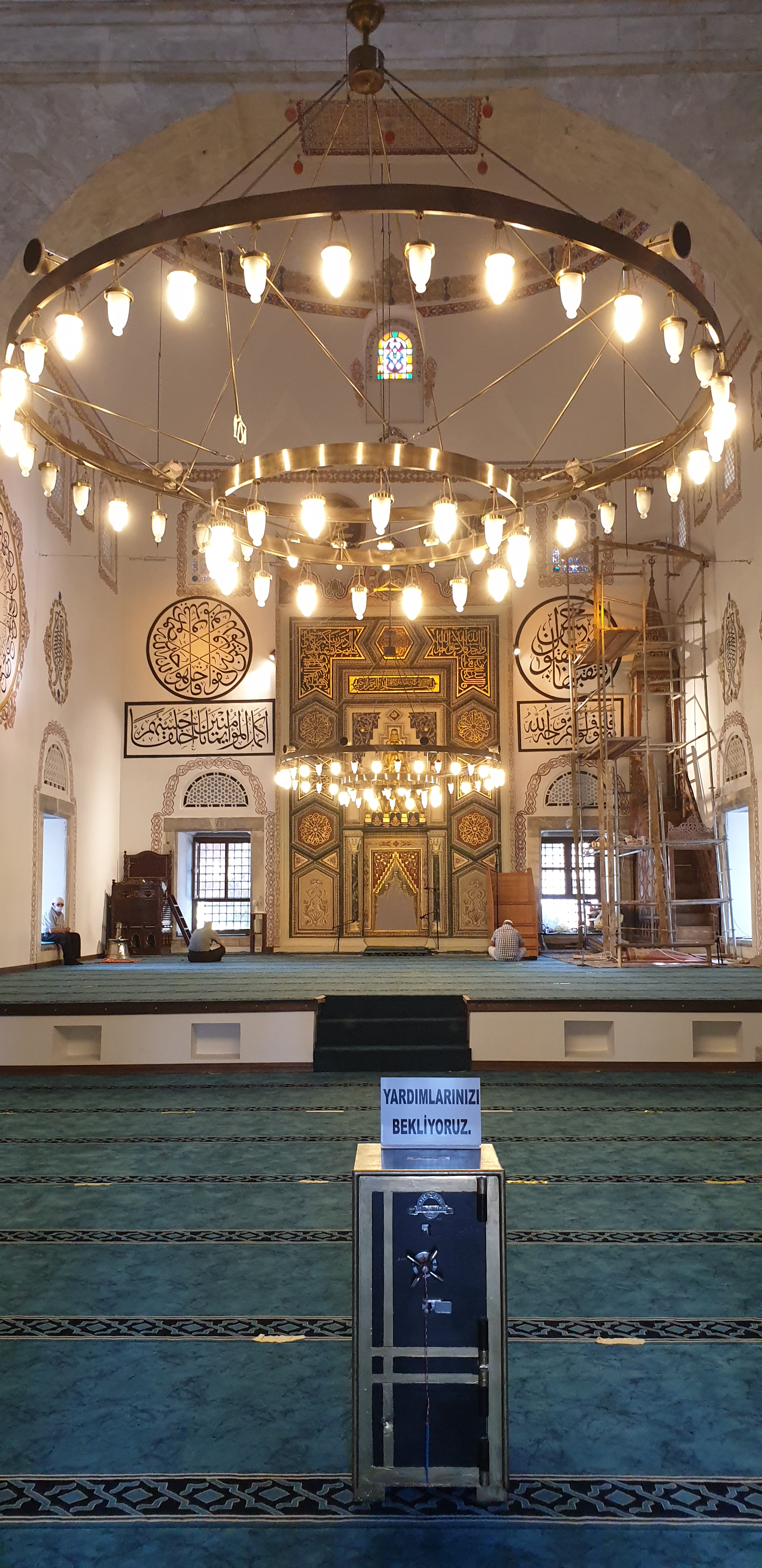 Bursa'daki Yıldırım Bayezid Camisi'nin mihrabı